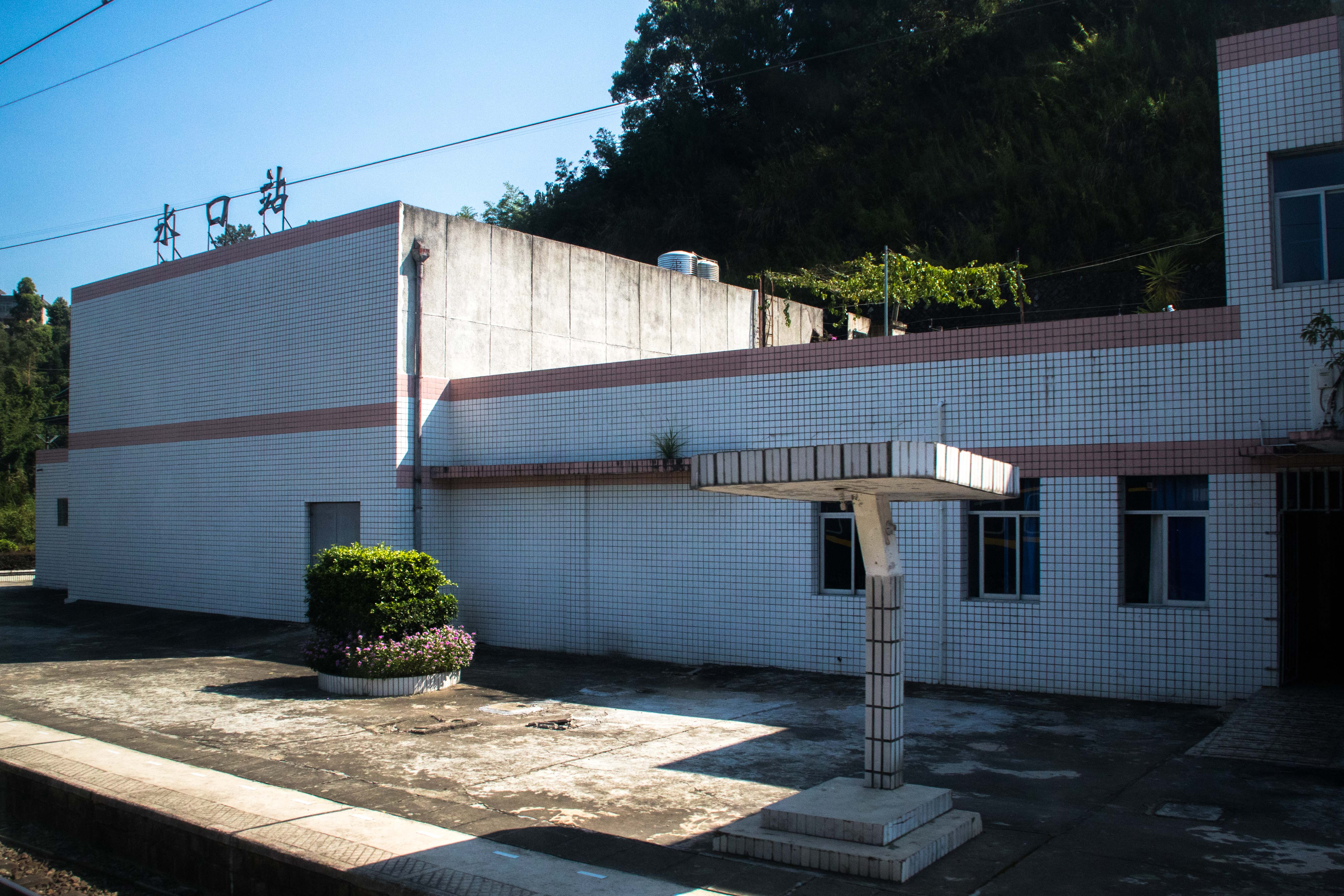 中文（中国大陆）: 水口站站房